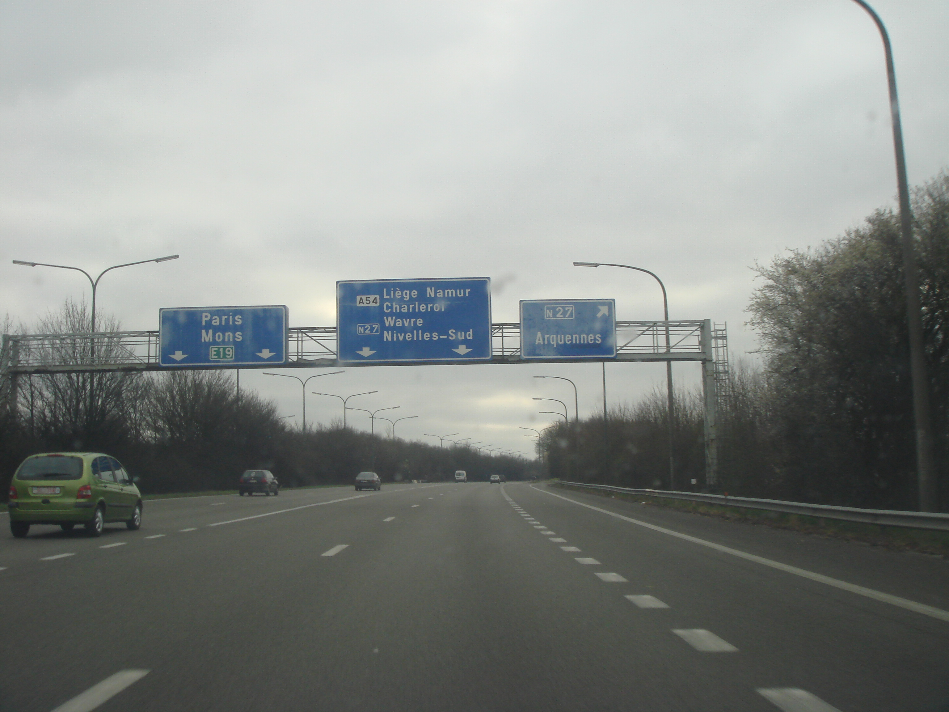 Echangeur d'Arquennes en Belgique